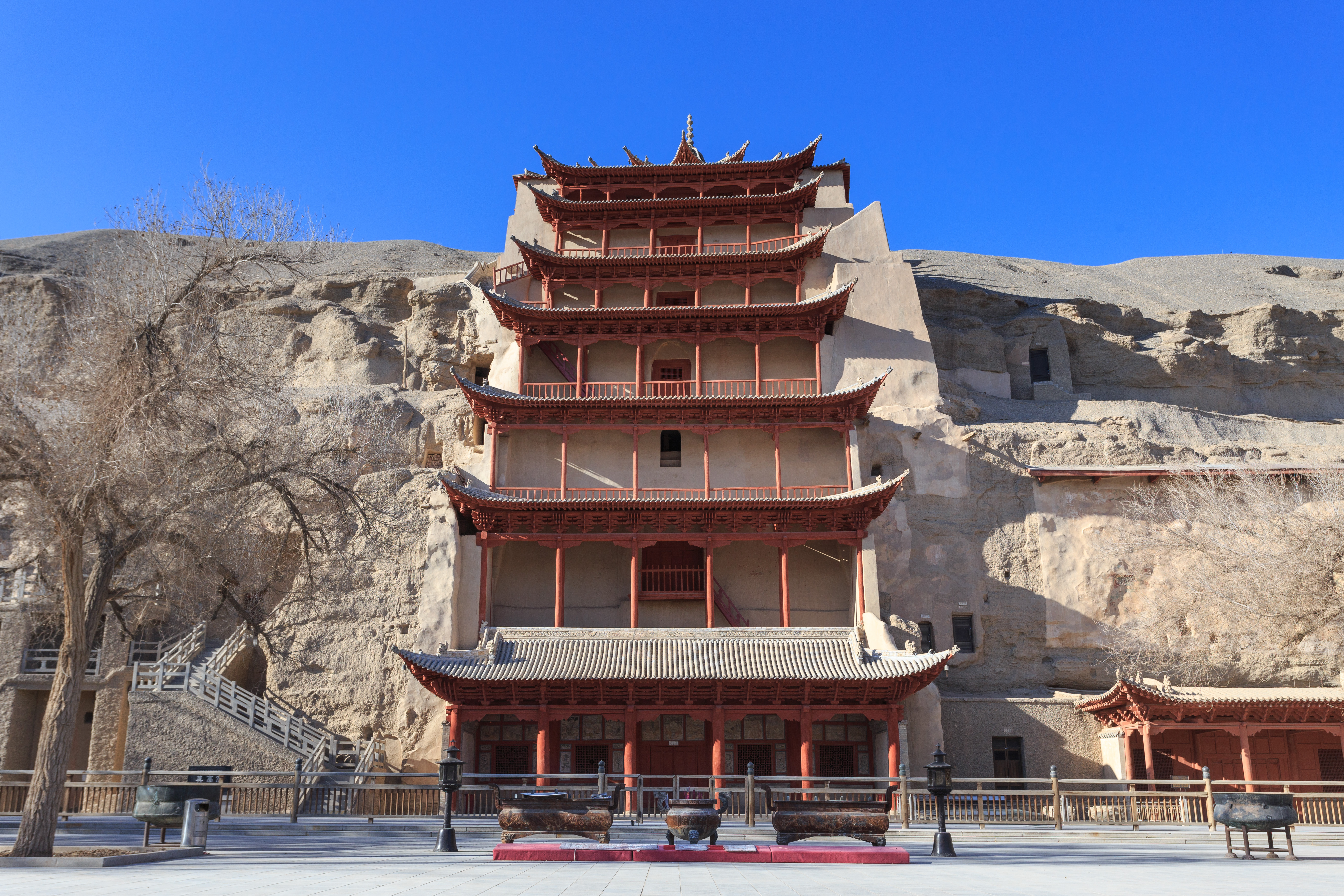 敦煌莫高窟